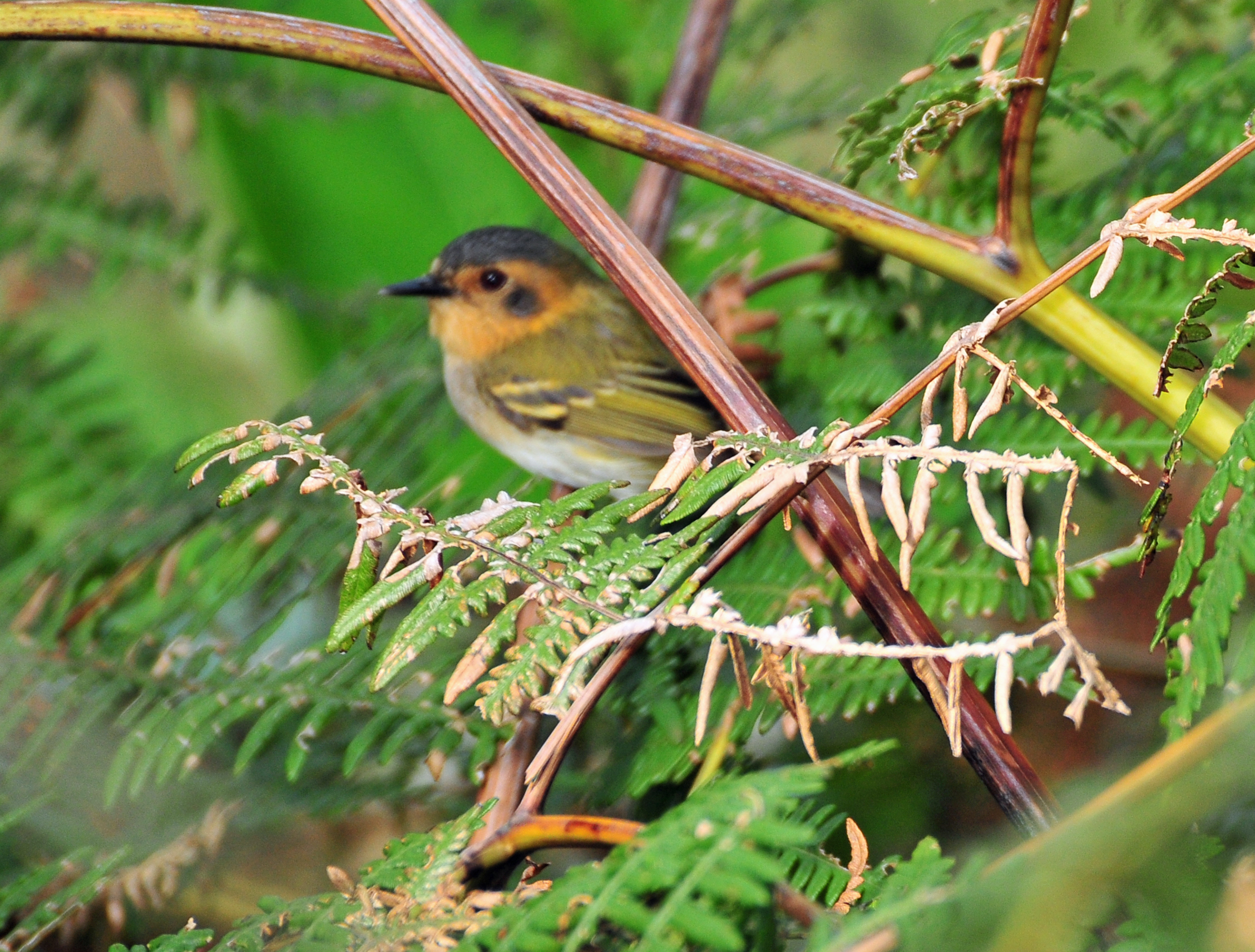 Poecilotriccus plumbeiceps (syn. Todirostrum plumbeiceps)